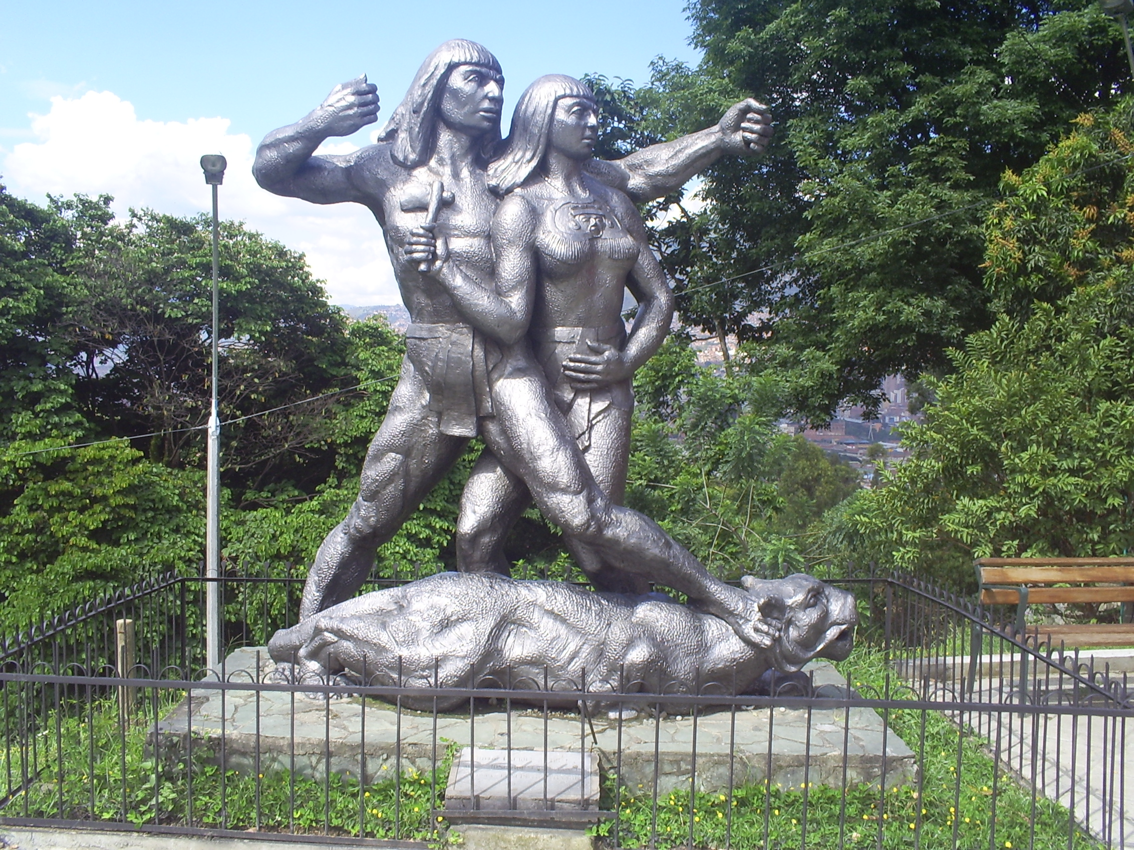 Cacique Nutibara obra de José Horacio Betancur en el Pueblito Paisa, Medellín, Colombia.